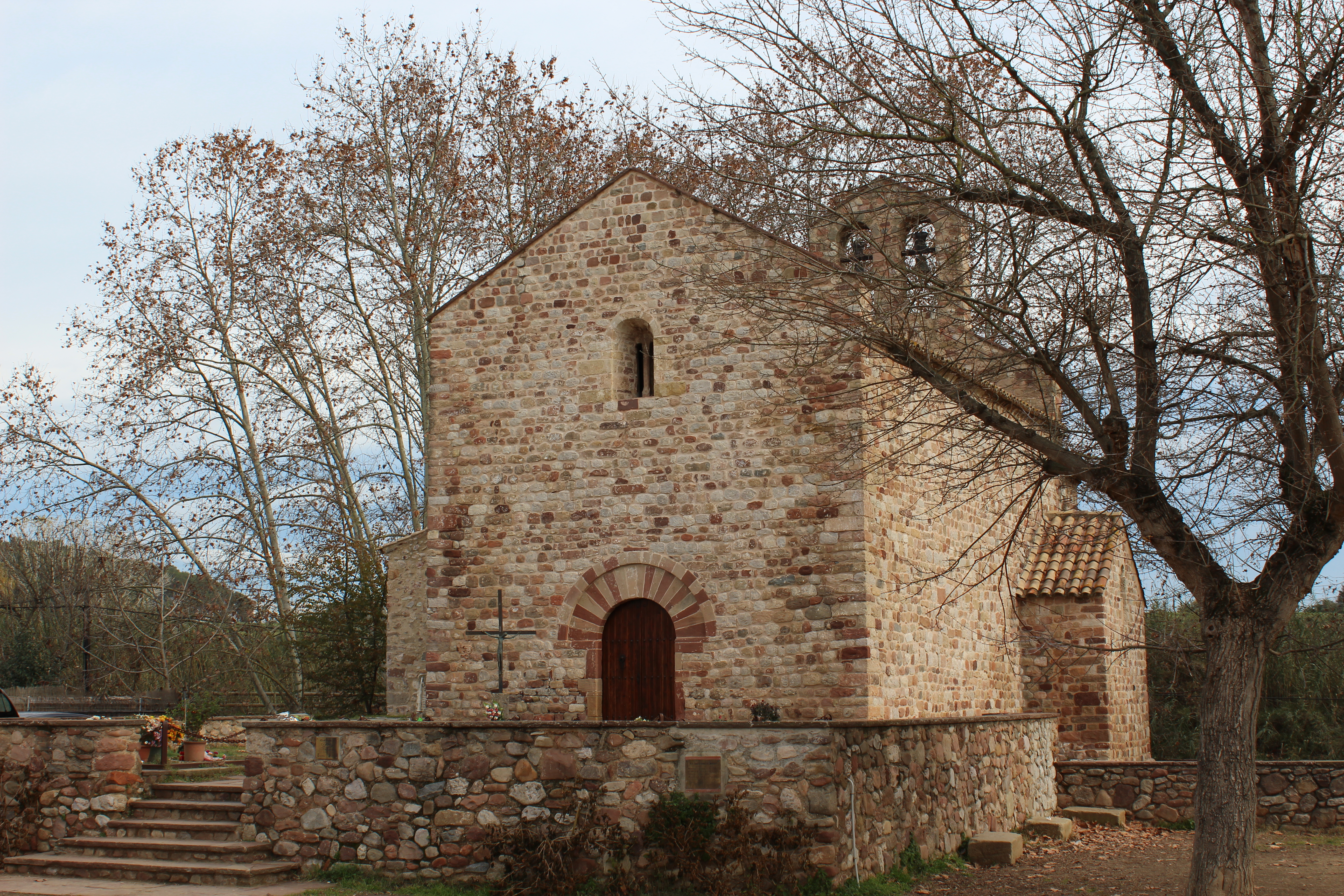 Església de Santa Maria de Gallecs (Gallecs).